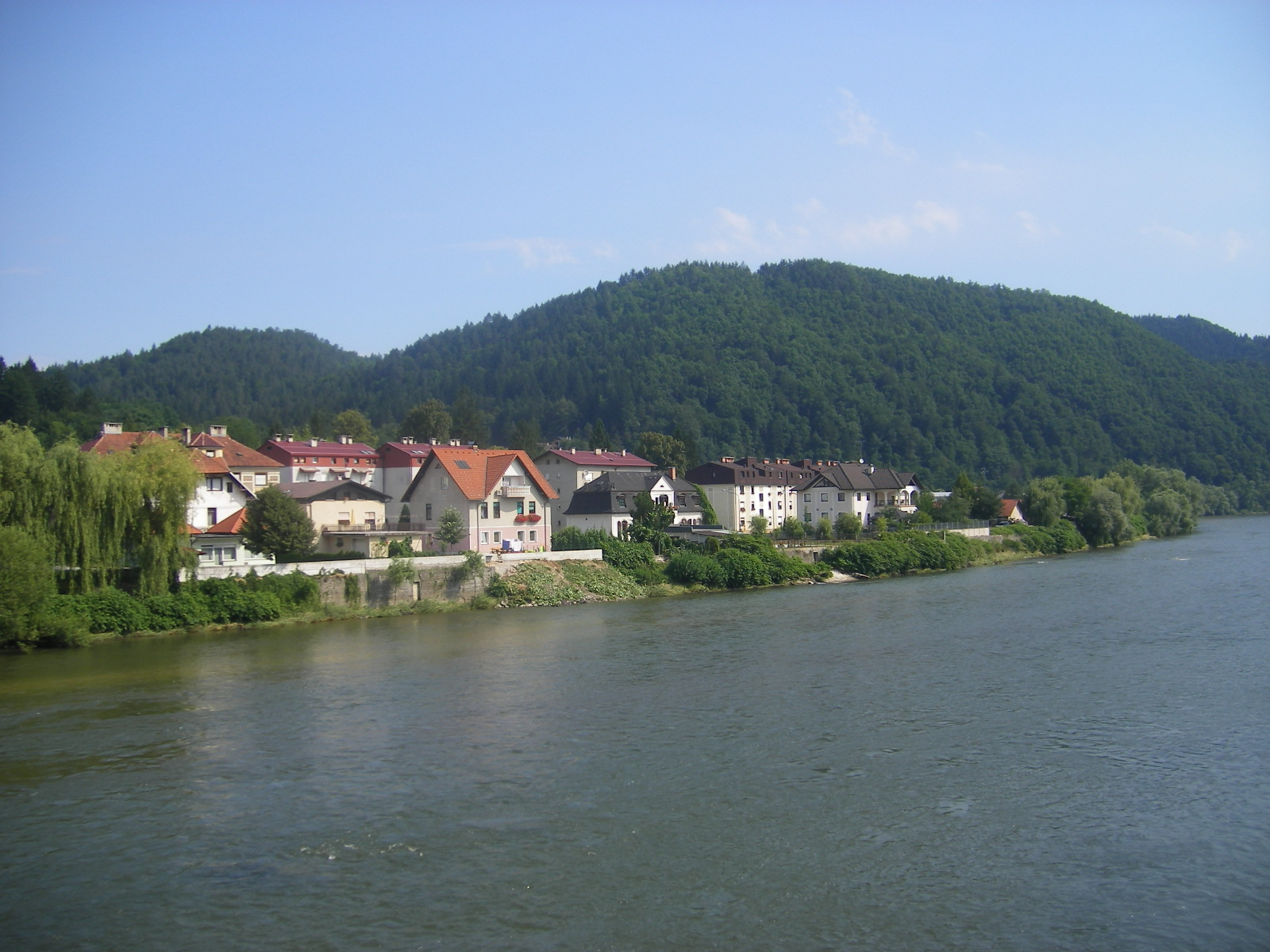 Litija